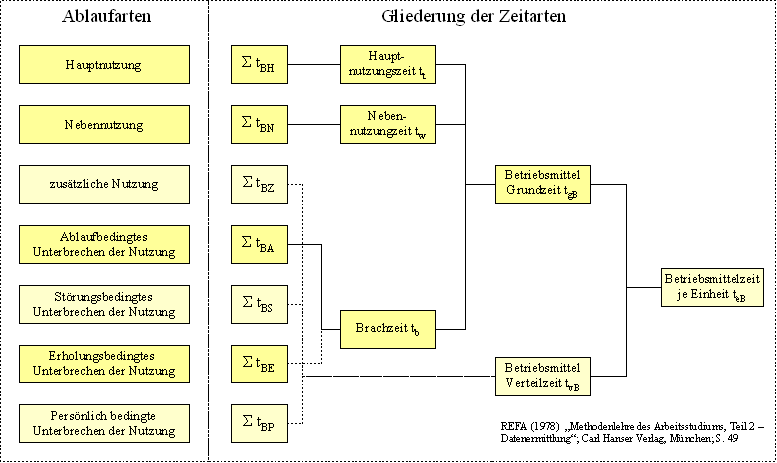 Gliederung der Zeitarten für den Menschen